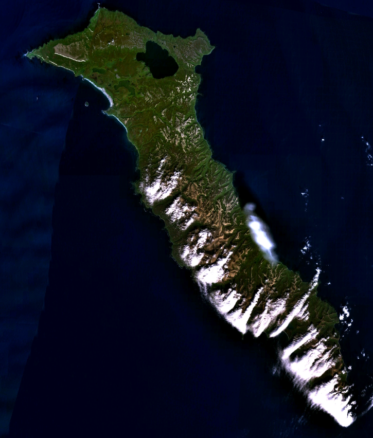 Остров Беринга. Крупнейший остров архипелага Командорские острова. Административно входит в Алеутский район Камчатского края России.